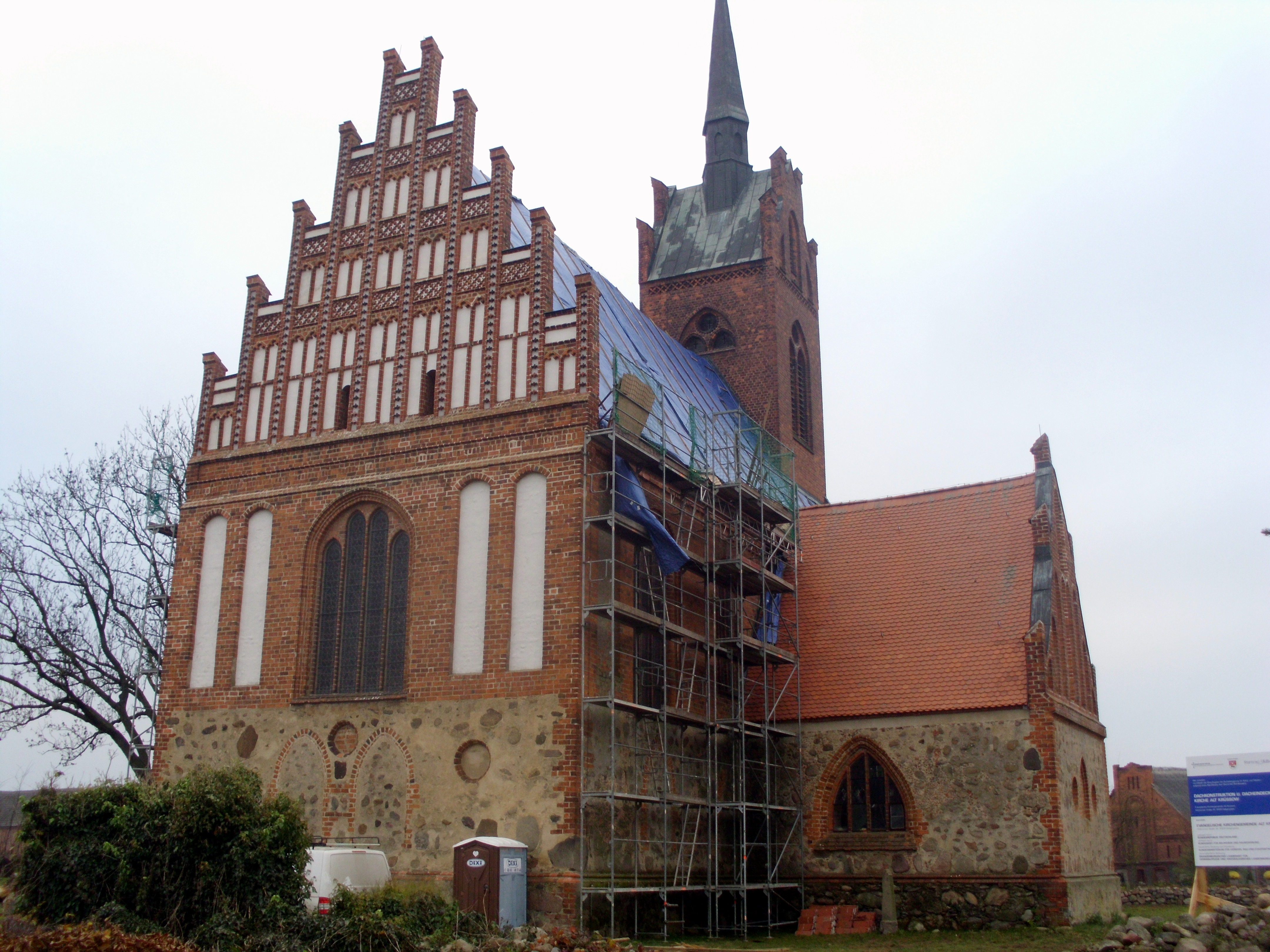 Wallfahrtskirche Alt Krüssow, Pritzwalk, Brandenburg, Germany